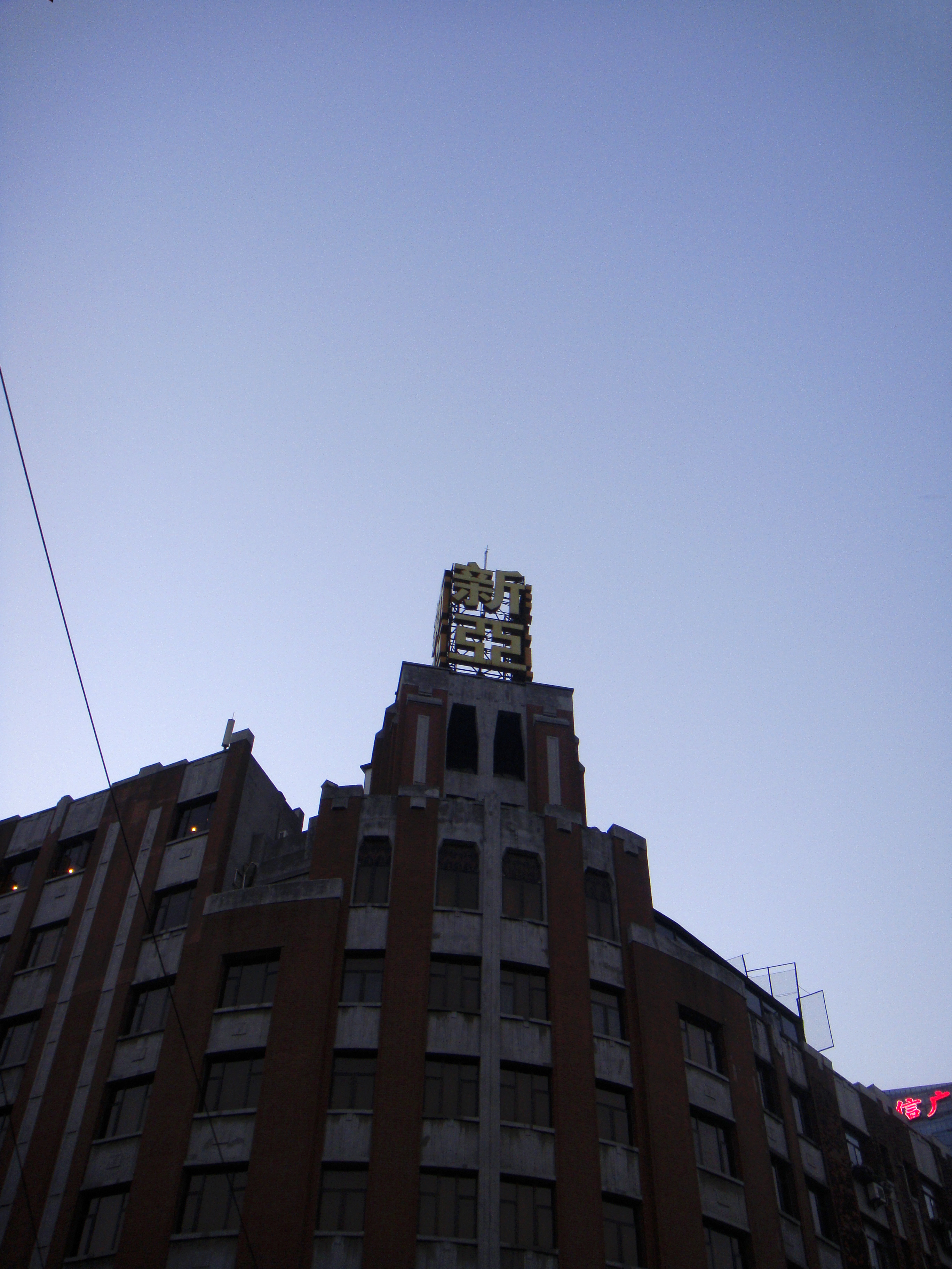 中文（中国大陆）: 上海新亚大酒店中部塔楼